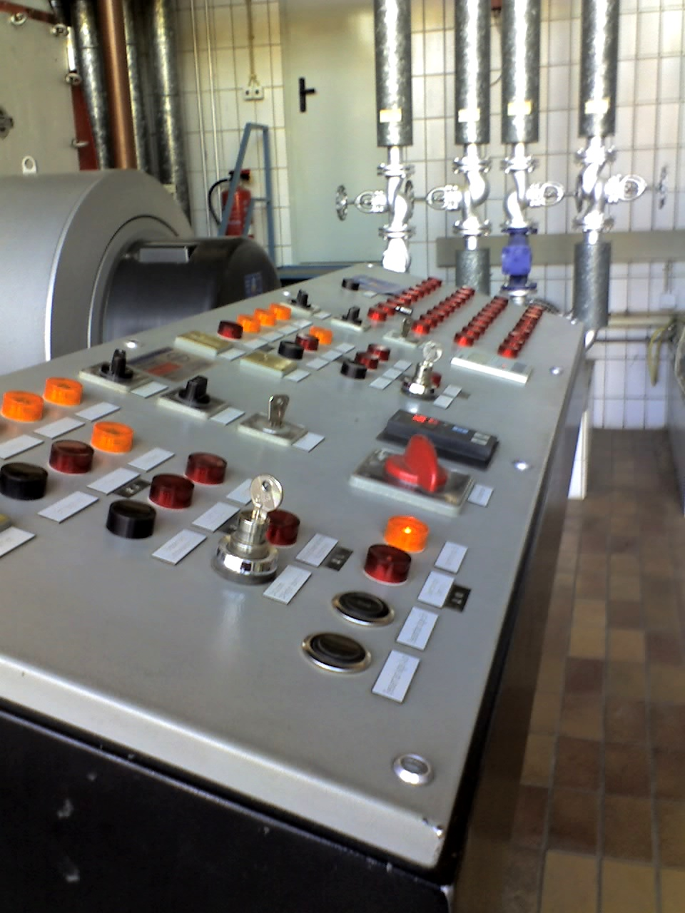 Kontrollpult von zwei Flammrohrrauschrohrkessel der Staatsbad Bad Steben GmbH